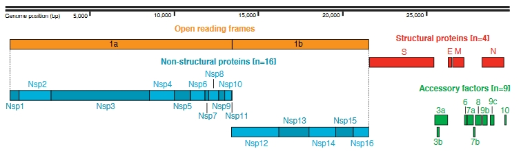 Organizacja genomu wirusa SARS-CoV-2